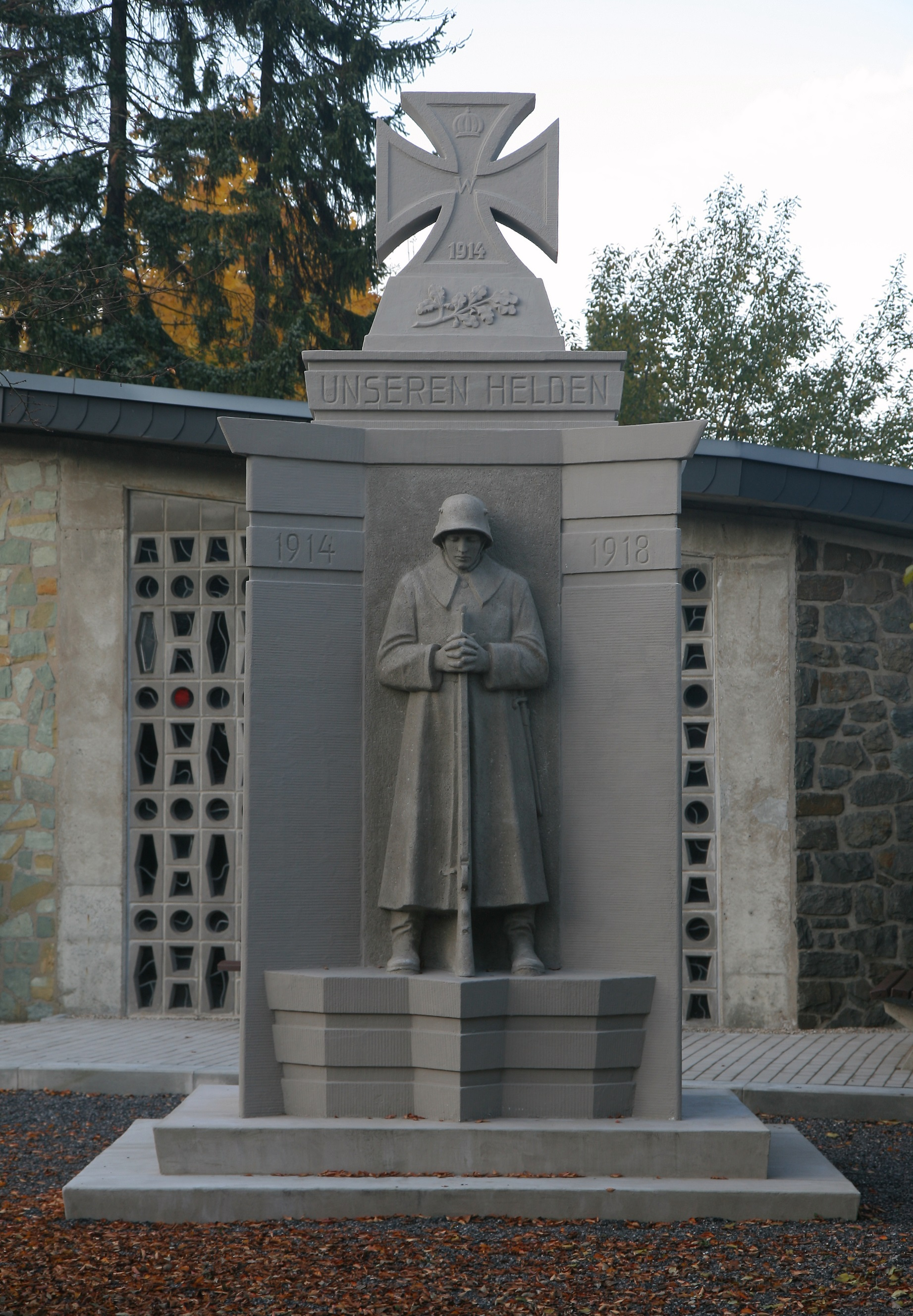 Kriegerehrenmal auf dem Friedhof in Iserlohn-Lössel, Lösseler Straße in Iserlohn. This image shows a heritage building in Germany, located in the North Rhine-Westphalian city Iserlohn (no. 237).